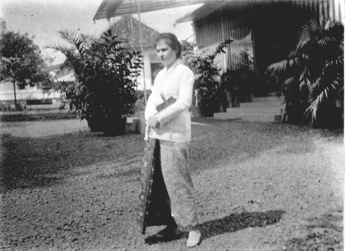 Foto. Lize van Breda de Haan in sarong en kabaja voor haar huis in Buitenzorg.